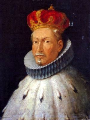 Dipinto del doge Alessandro Spinola